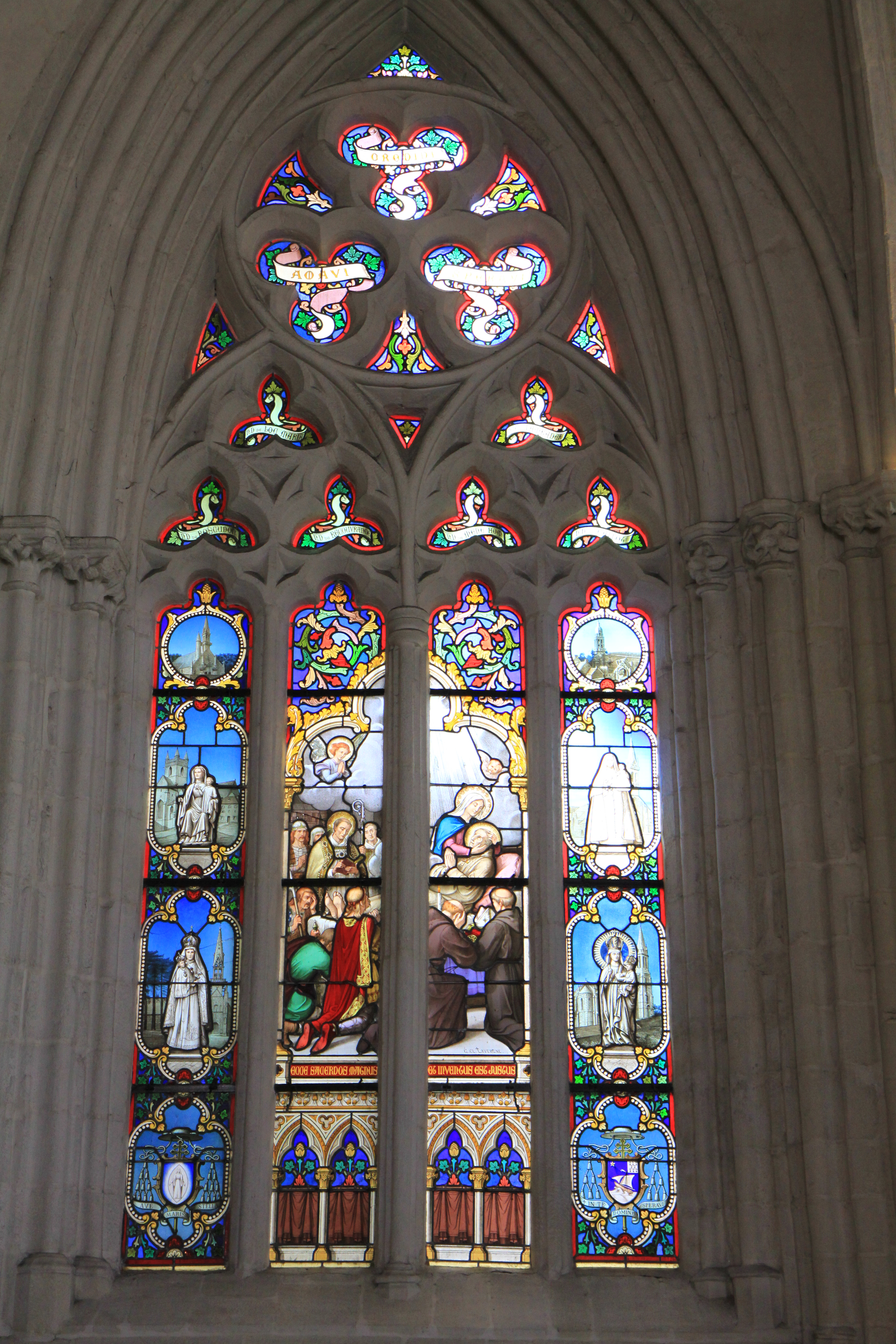 Un vitrail de la cathédrale Saint-Corentin de Quimper.